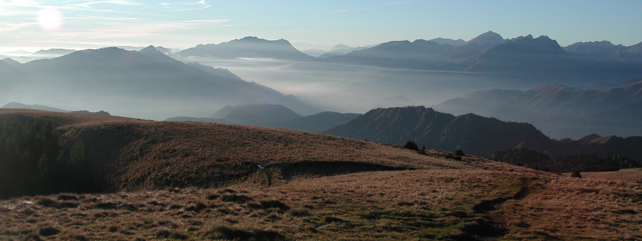 Alpi Orobie, Val Seriana, Italy